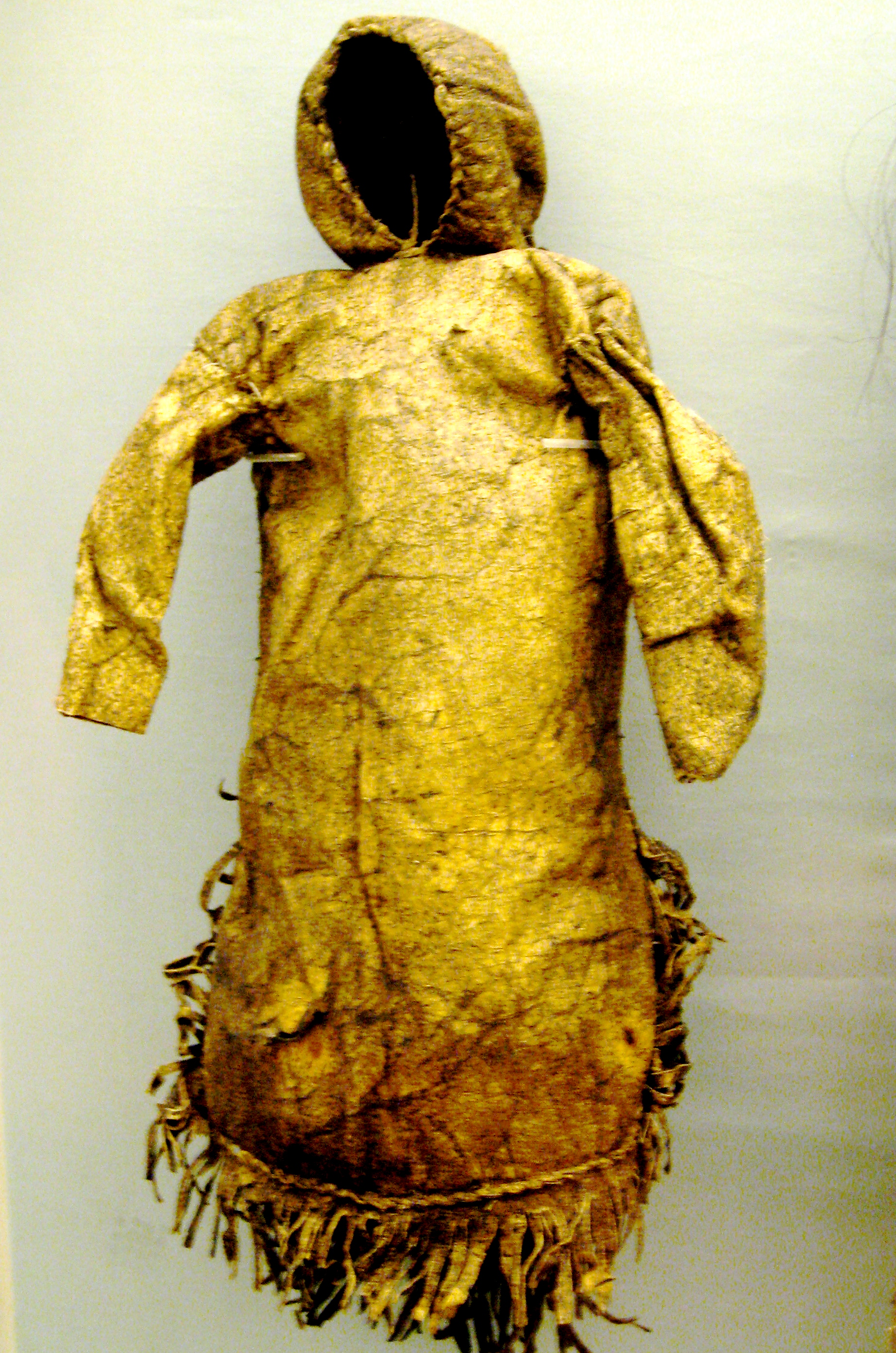 Inuit children's doll